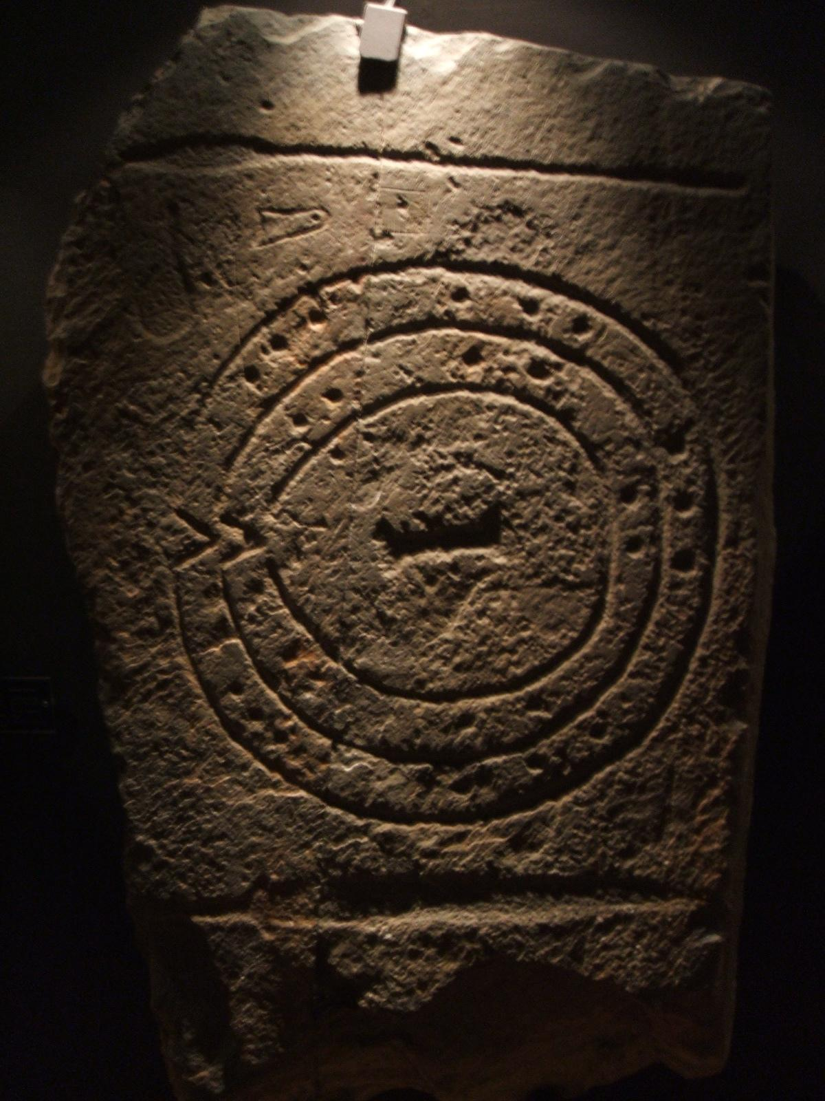 Brozas